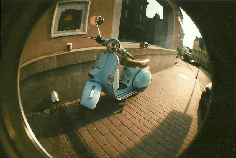 Пример снимка, снятого на фотоаппарат Fisheye 2.